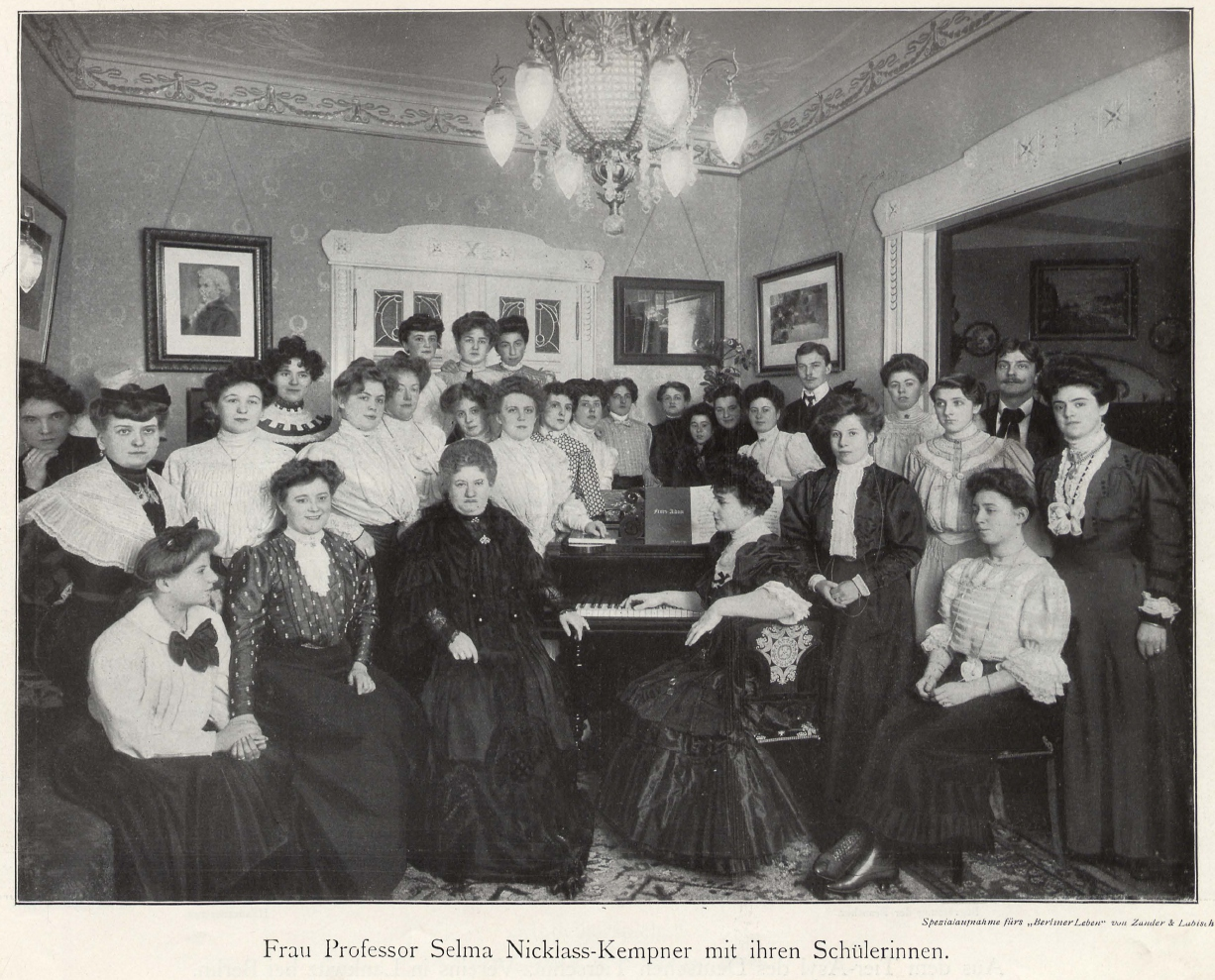 Selma Nicklass-Kempner (1850-1928), deutsche Sängerin (Sopranistin) und Gesangslehrerin.